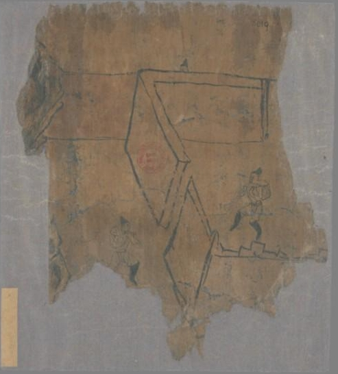 Dessin à l'encre : muraille et trois personnages dont deux portent des hottes. 25 × 22 cm